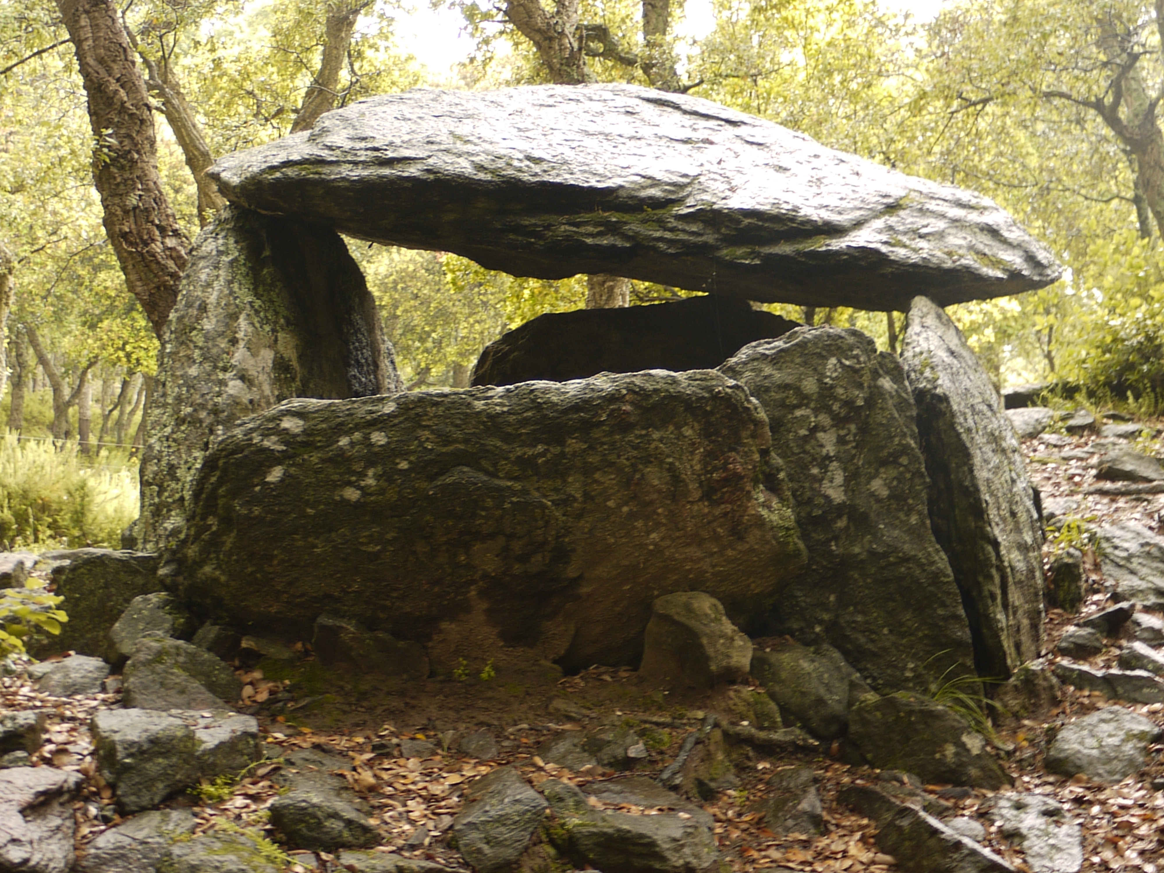 Dolmen de la Siureda à Maureillas.